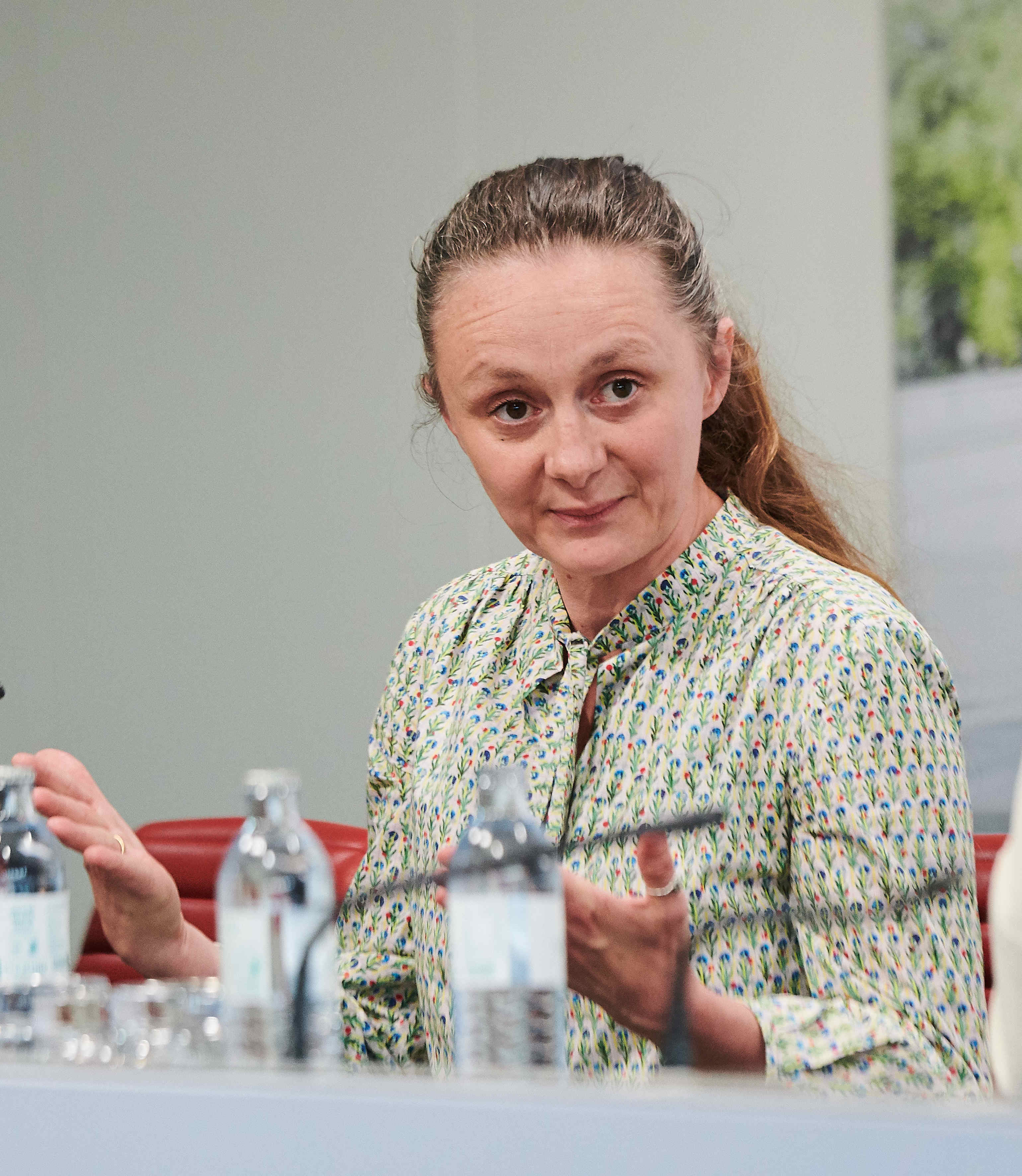 14.05.2020 ; Pressekonferenz „Rotes Foyer“ mit Rendi-Wagner und KünstlerInnen im SPÖ-Parlamentsklub ; An der Pressekonferenz zum Thema „Kultur ist systemrelevant – Arbeitsmöglichkeiten, Perspektiven und ein Rettungsschirm für KünstlerInnen und Kreative“ haben die SPÖ-Partei-und Klubvorsitzende Pamela Rendi-Wagner, SPÖ-Kultursprecher Thomas Drozda, Schauspielerin Gerti Drassl, Regisseur und Puppenspieler Nikolaus Habjan, die Schriftstellerin Julya Rabinowich, Filmemacherin Kurdwin Ayub sowie Regisseur Markus Schleinzer teilgenommen. © SPÖ-Parlamentsklub/ K. Prinz